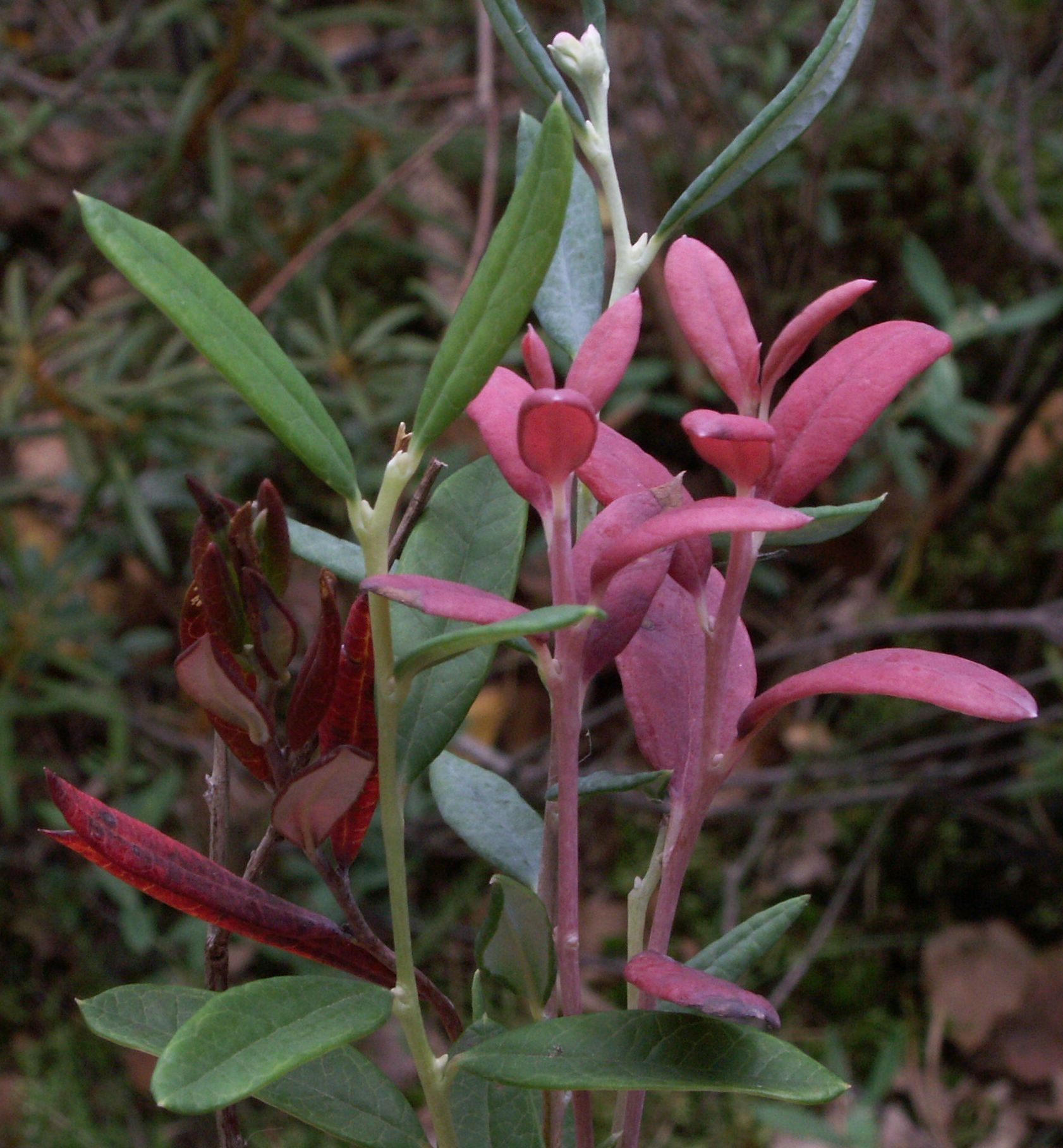 Andromeda polifolia, Zusammenstellung verschiedenfarbiger Exemplare, befallen mit Exobasidium Exobasidium karstenii